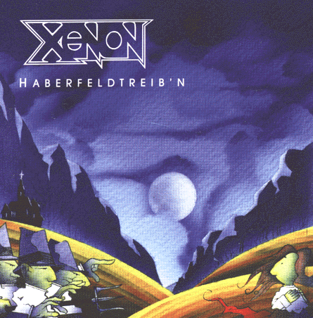 CD-Cover der CD "Haberfeldtreibn"